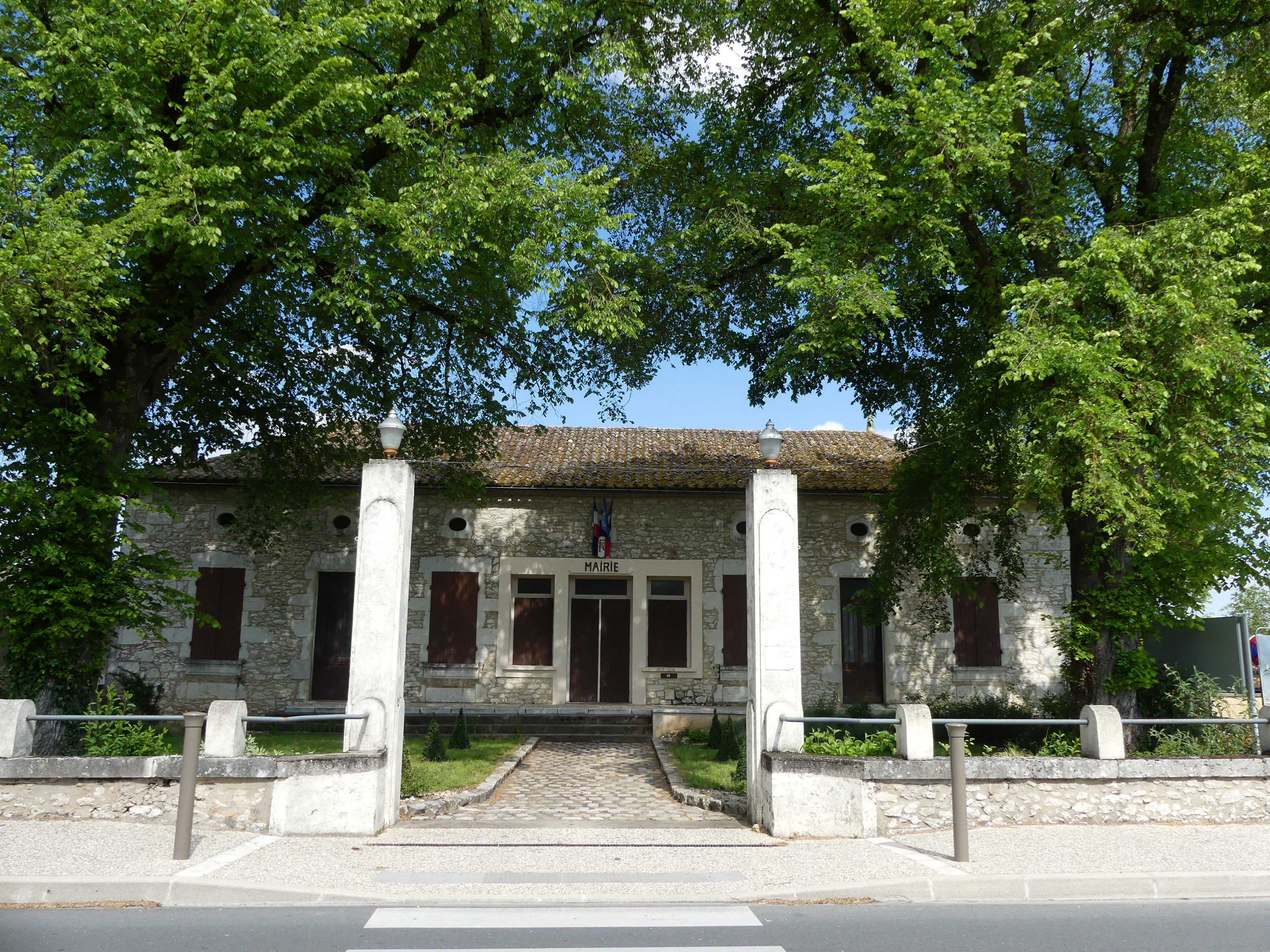 La mairie de Bouniagues, Dordogne, France.